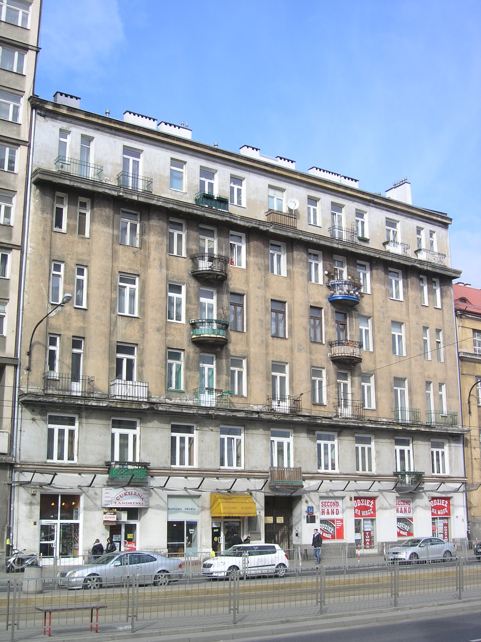 Kamienica w której mieszkał w latach 1919-1934 – poeta Edward Szymański. Aktualny adres ul. Wolska 54 w Warszawie (stan na marzec 2012)